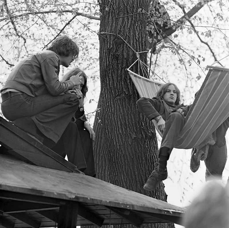 Kungsträdgården, maj 1971. Demonstrationer mot fällningen av almarna.